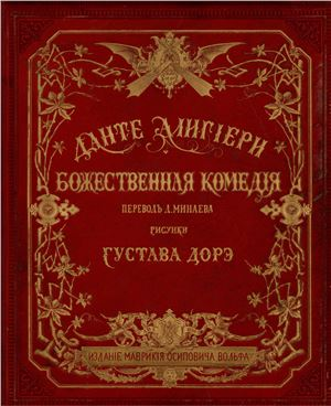 Обложка перевода "Божественной комедии" Данте Д. Минаева, выпущенного в 1870-е годы в России